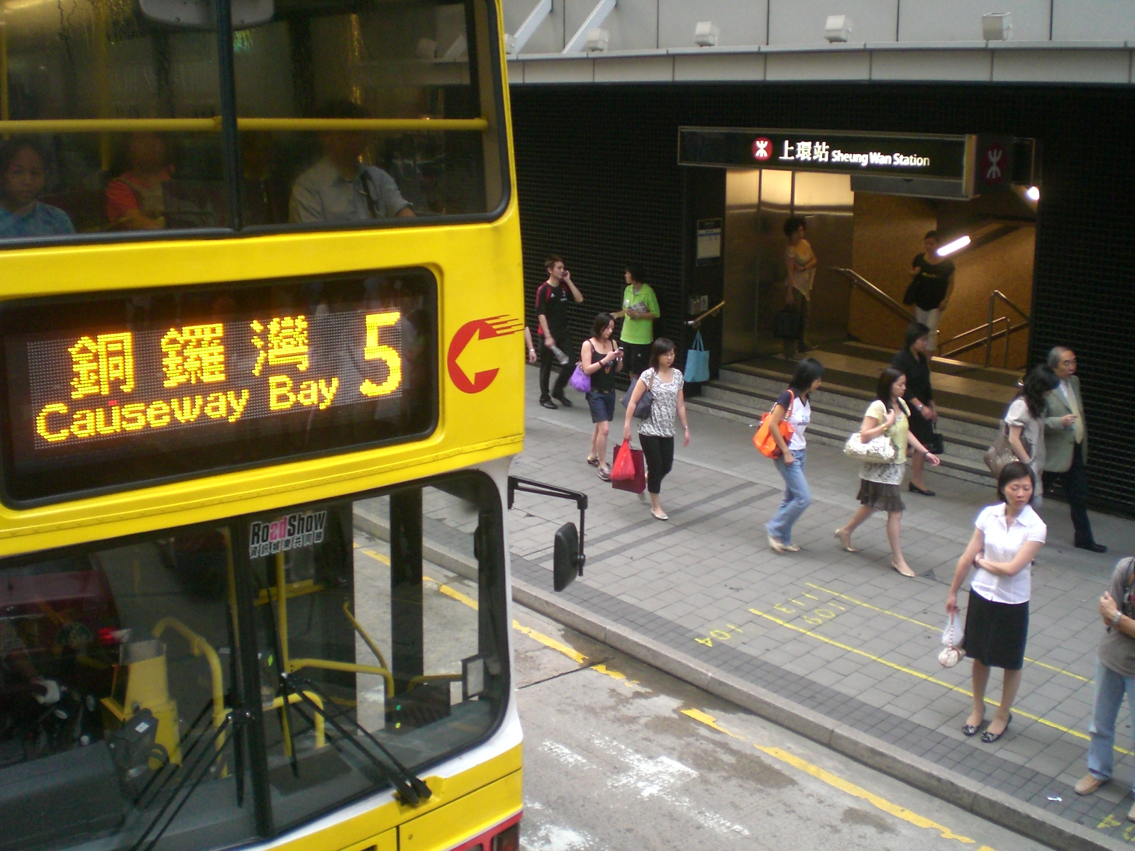 德輔道中, 城巴5號線,香港地鐵港島綫上環站E3出口